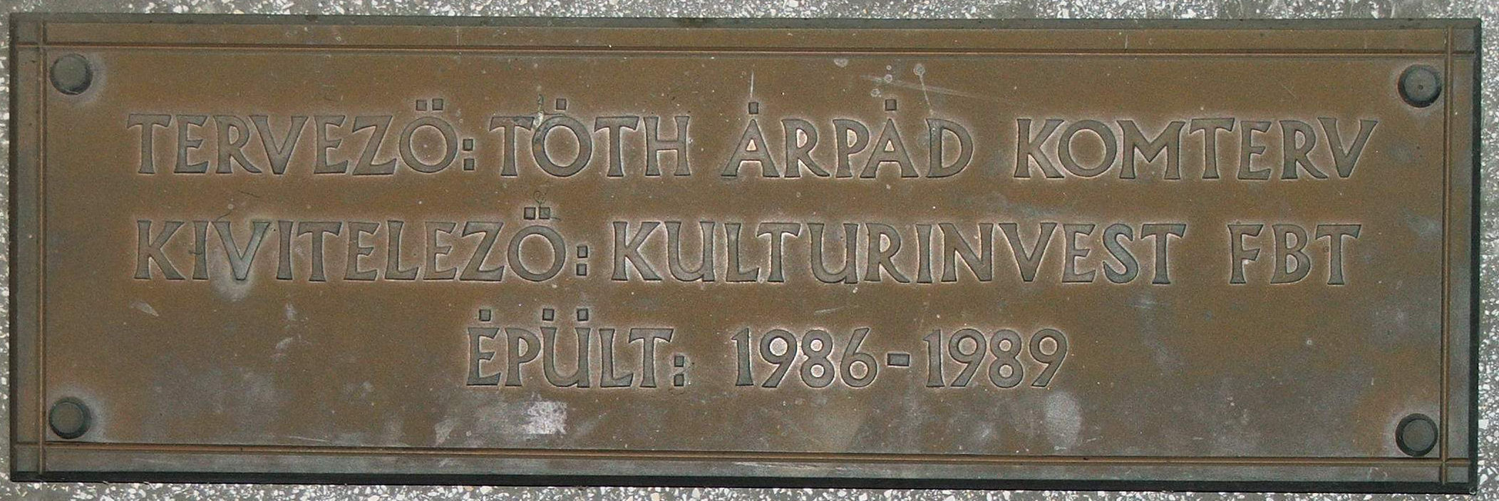 Emléktábla a Dobó építéséről